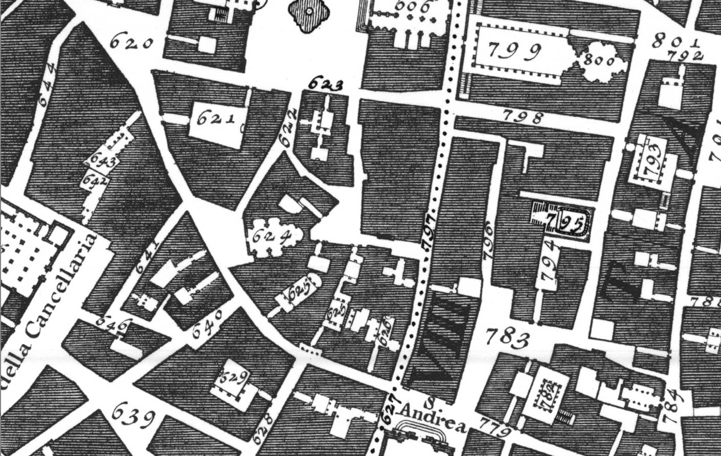 Roma, isolato dei Palazzi Massimo fino agli anni 1880-90, prima dell'apertura di Corso Vittorio. Particolare da Nuova Topografia di Roma di Giovanni Battista Nolli (1748)